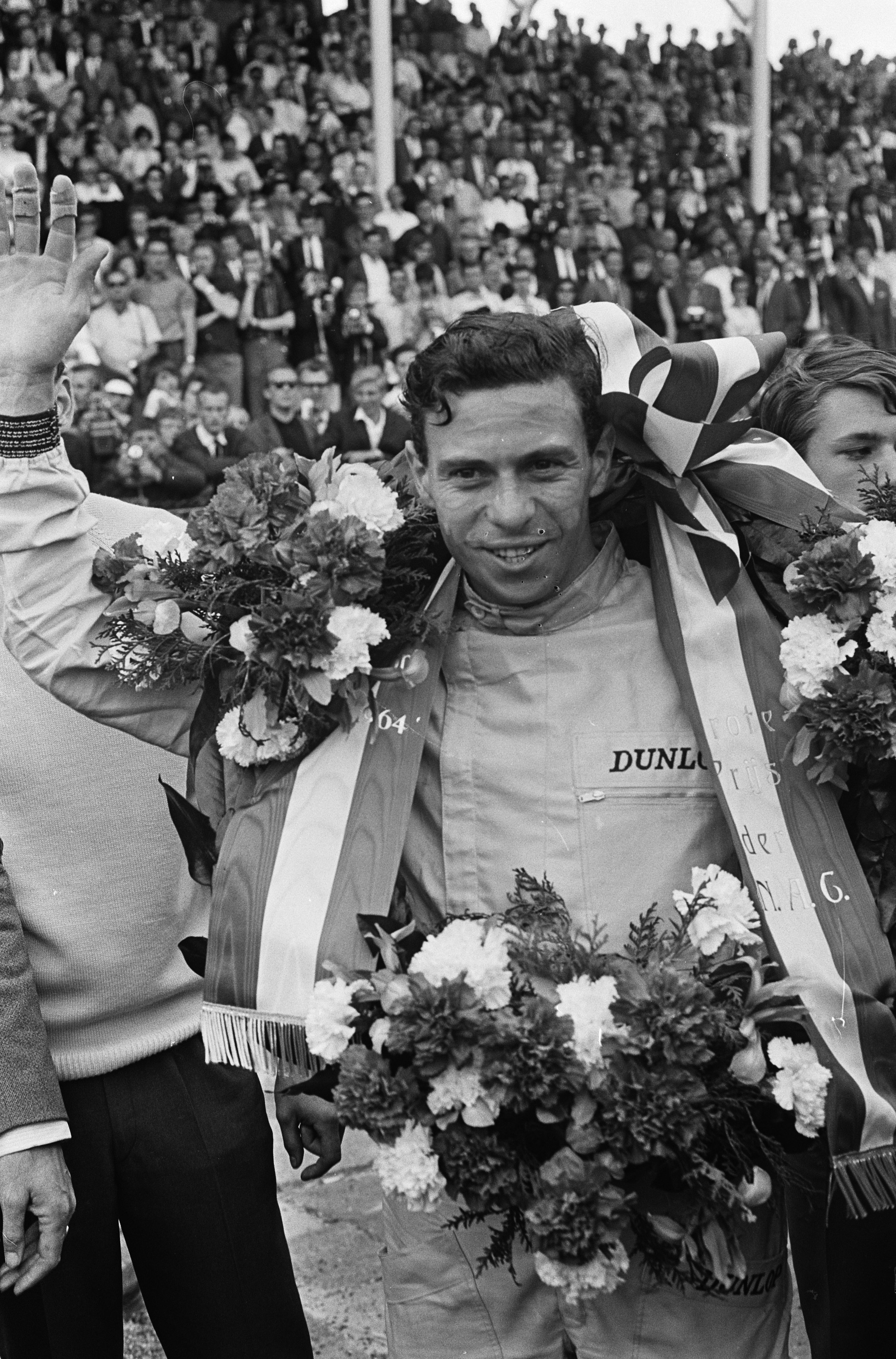 Grand Prix van Nederland, het rennersveld Jim Clark met de krans tijdens de huldiging.